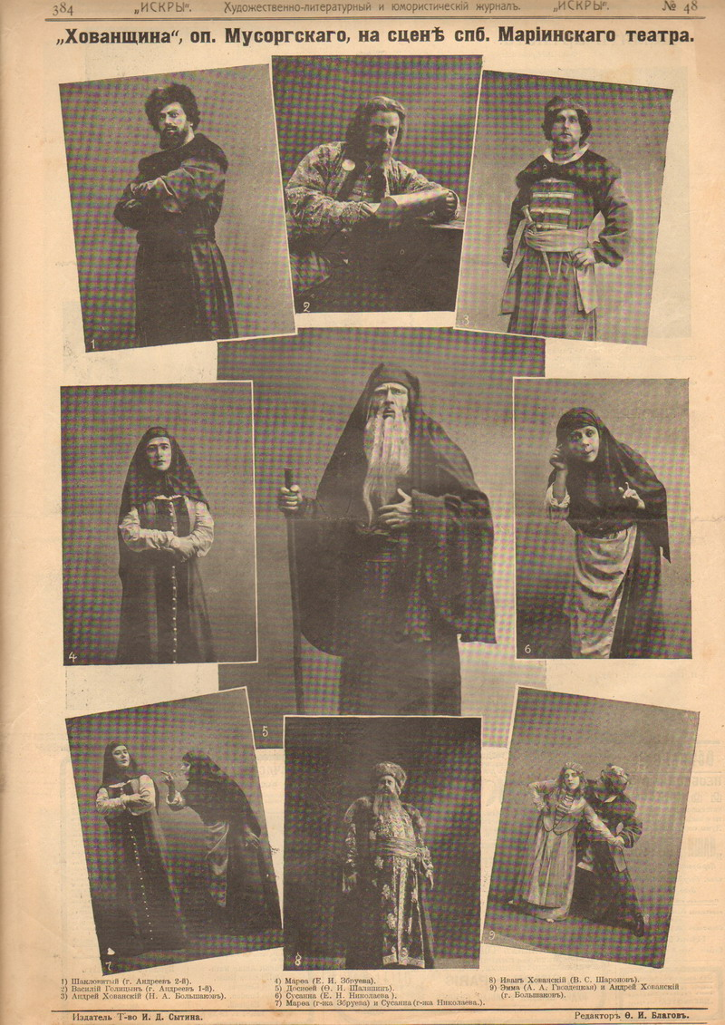 Иллюстрированный художественно-литературный и юмористический журнал с карикатурами «Искры».